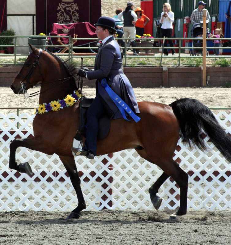 Morgan